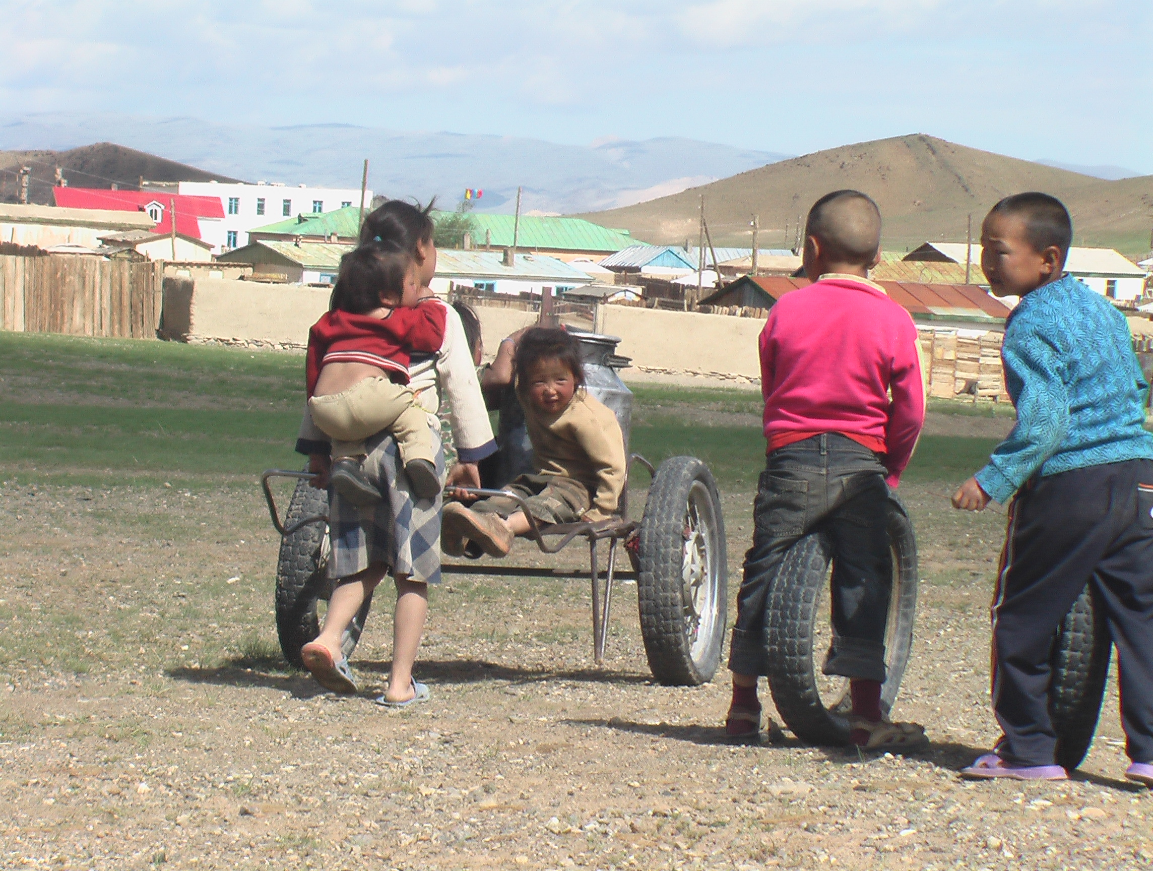 scene in Bayan-Öndör sum (Bayankhongor aimag), Mongolia